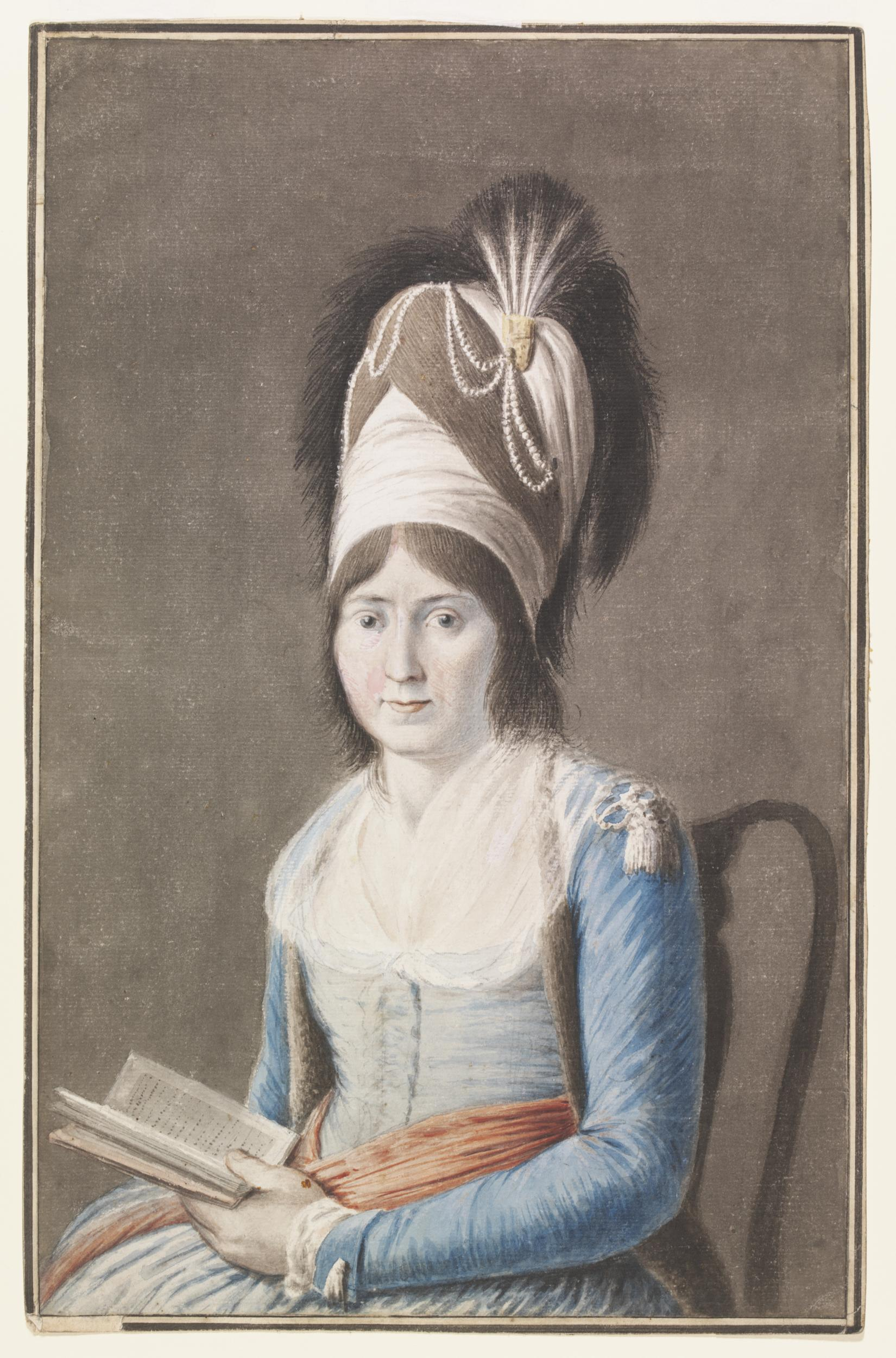 Clara Barthold Mayer'in Portresi